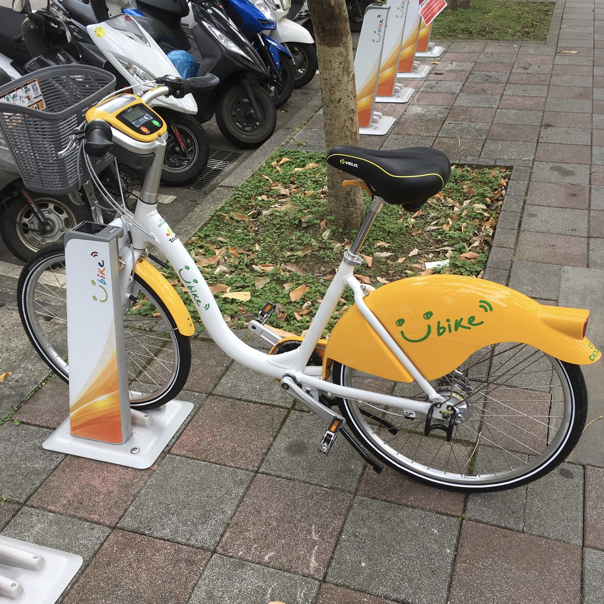 YouBike 2.0，車號0100355，臺大男一舍前站